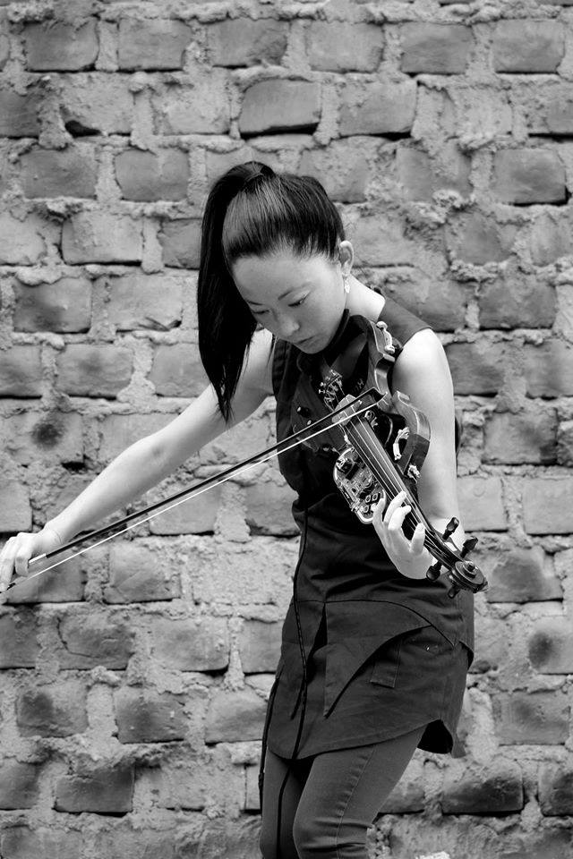 Pauchi Sasaki (Lima, 1981) es una compositora, artista experimental multidisciplinaria y violinista peruana. Foto tomada en Lima, 2018.